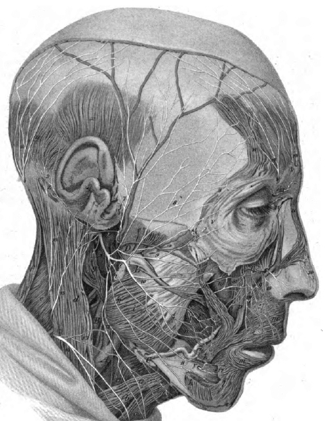 "Der Antlitztheil des nervus facialis." Nervenverlauf des N. facialis (VII) am Kopf, Ansicht von rechts lateral. Nach einem Präparat von Nikolaus Rüdinger (1832-1896). Stahlstich von Arnold Meermann (1829-1908) nach einer Fotografie von Joseph Albert (1825-1886).